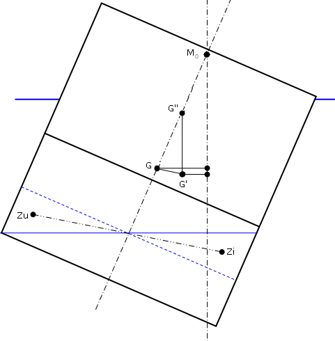 Eigen ontwerp.